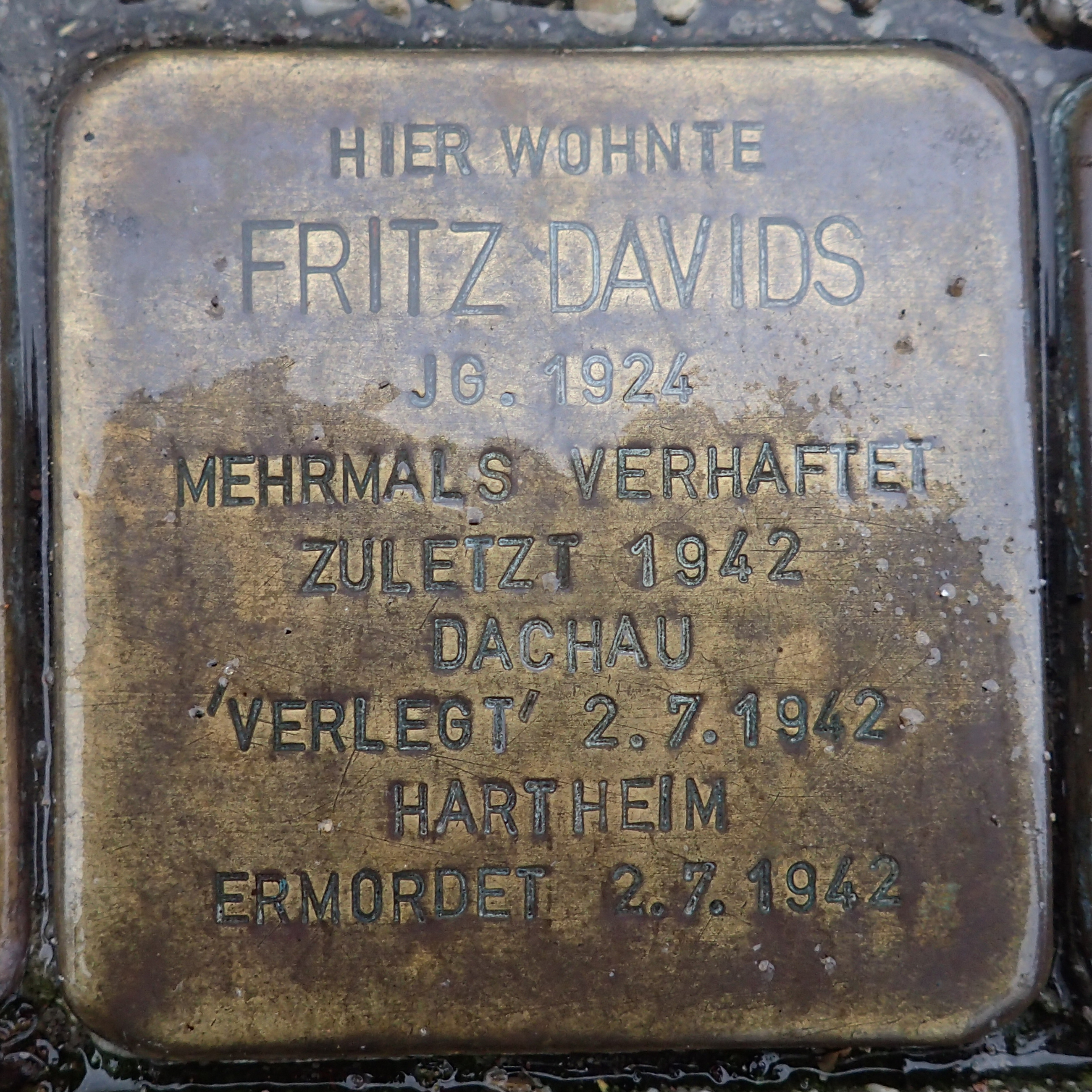 Stolperstein Geldern Brühlscher Weg 23 Fritz Davids